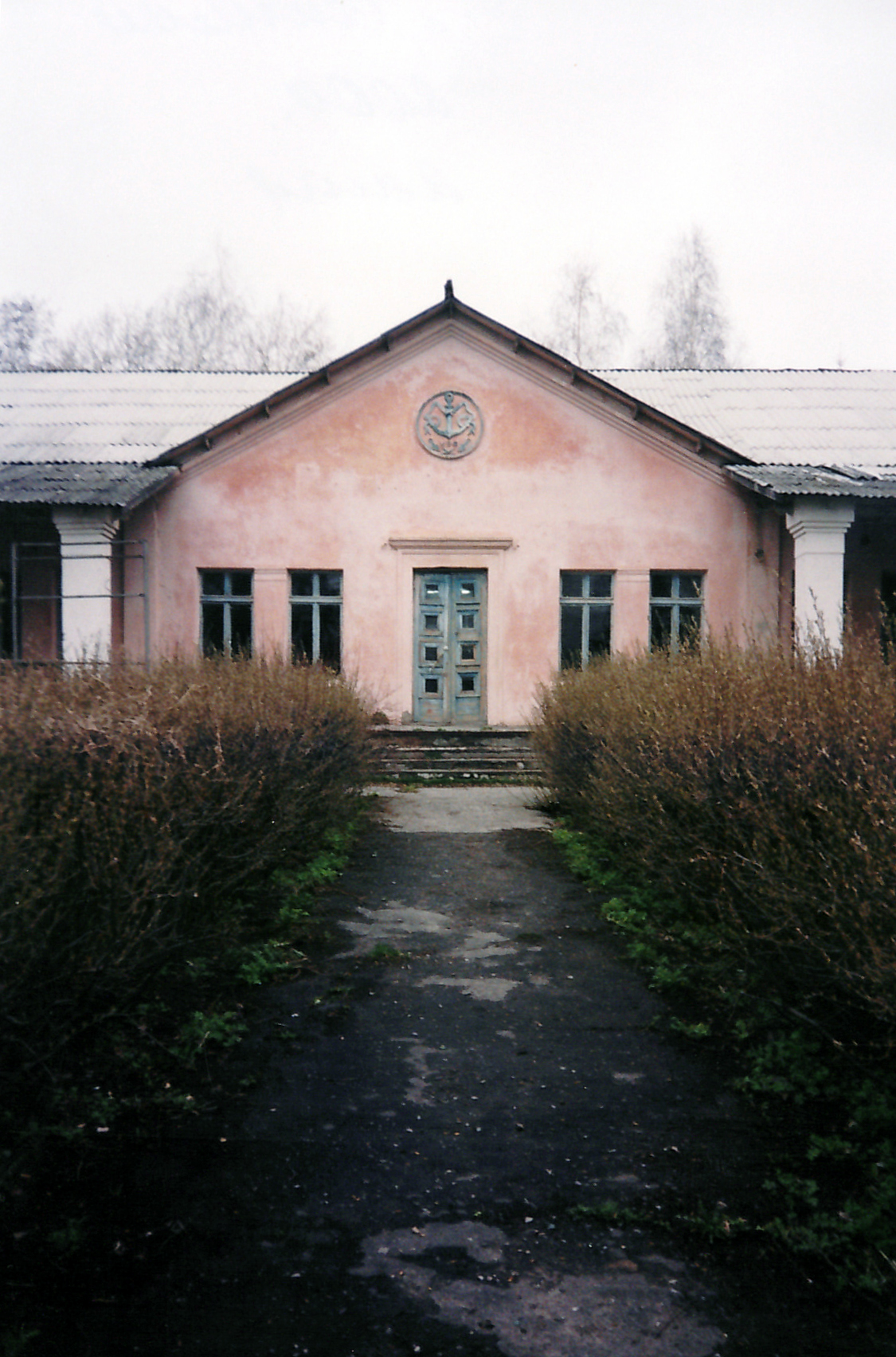 Речной вокзал г. Сенгилея (2005)